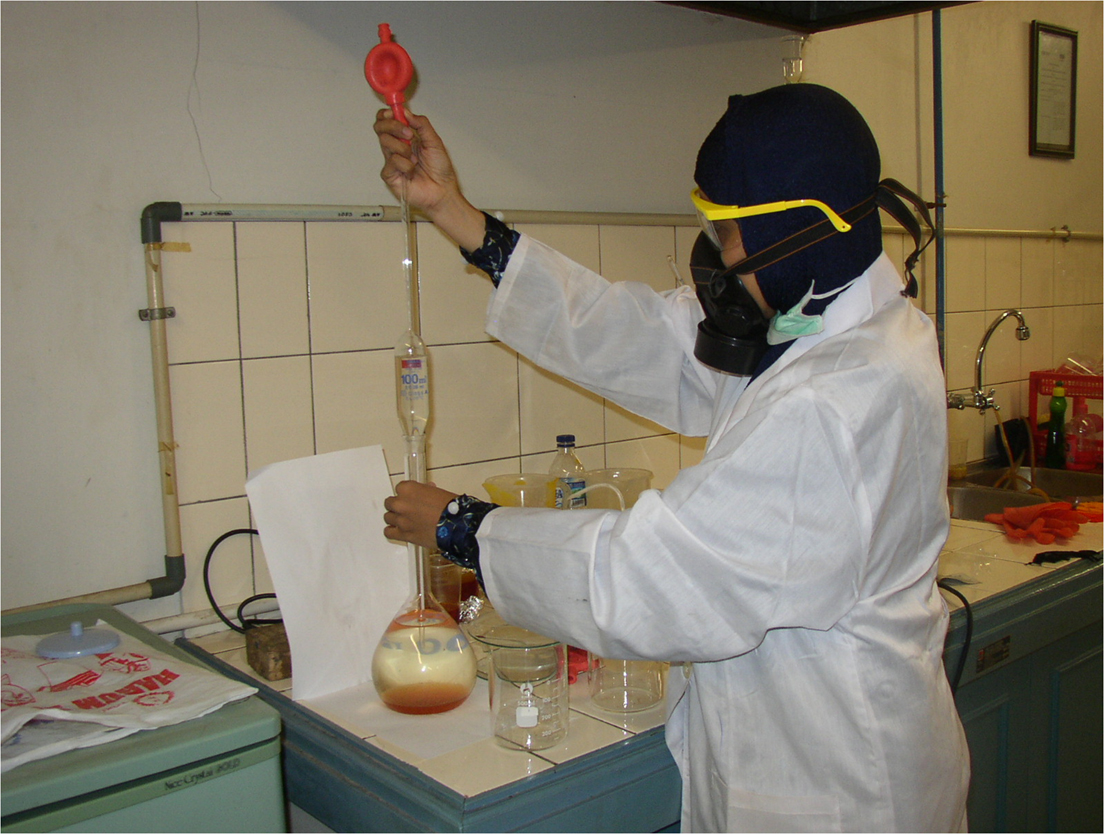 Pengolahan lanjut produk agroindustri skala laboratorium